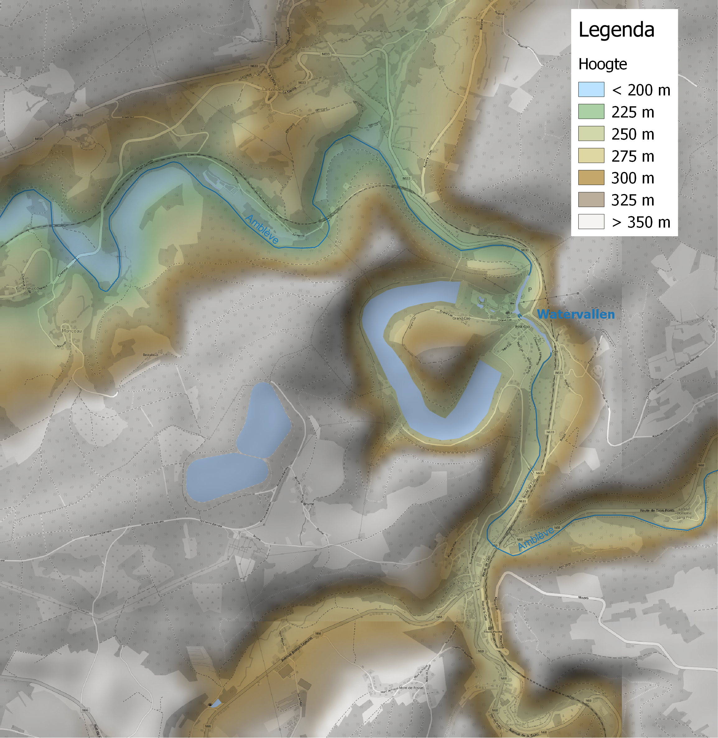 hoogtekaart van de omgeving van Coo, België This map may be incomplete, and may contain errors. Don't rely solely on it for navigation.